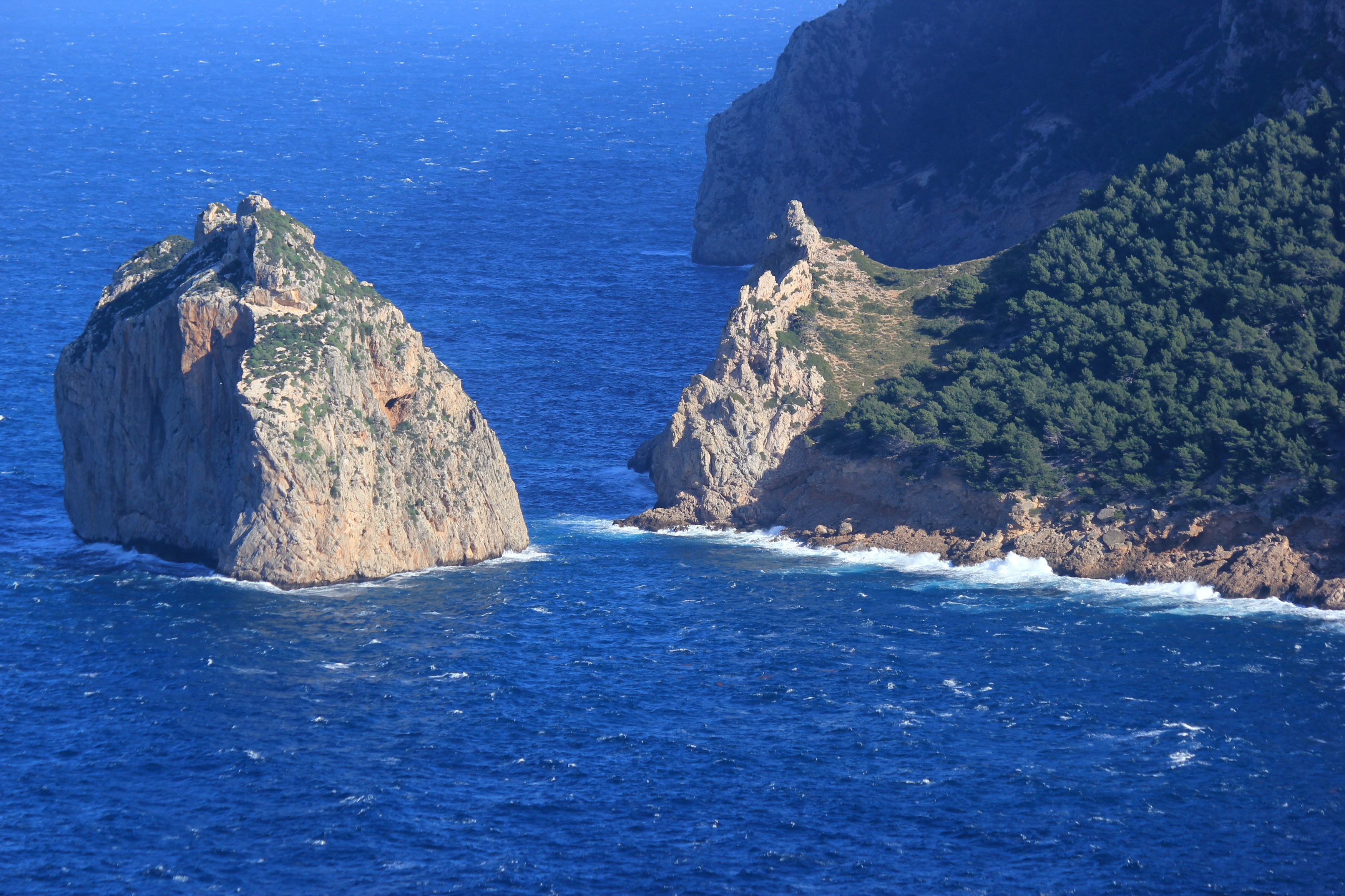 Blick auf die kleine Insel El Colomer an der Halbinsel Formentor, Mallorca.